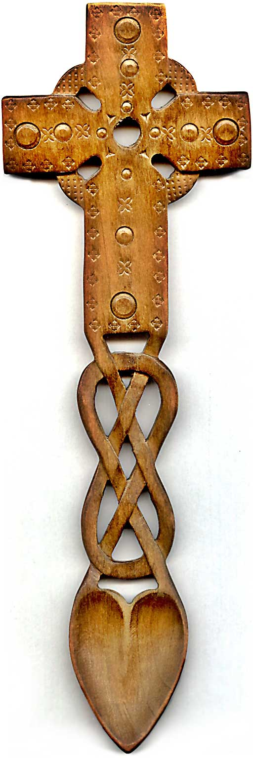 A love spoon is an ornately carved spoon traditionally made from a single piece of wood by young men, especially in Wales, as a love token for their sweethearts, to show their affection and intentions.